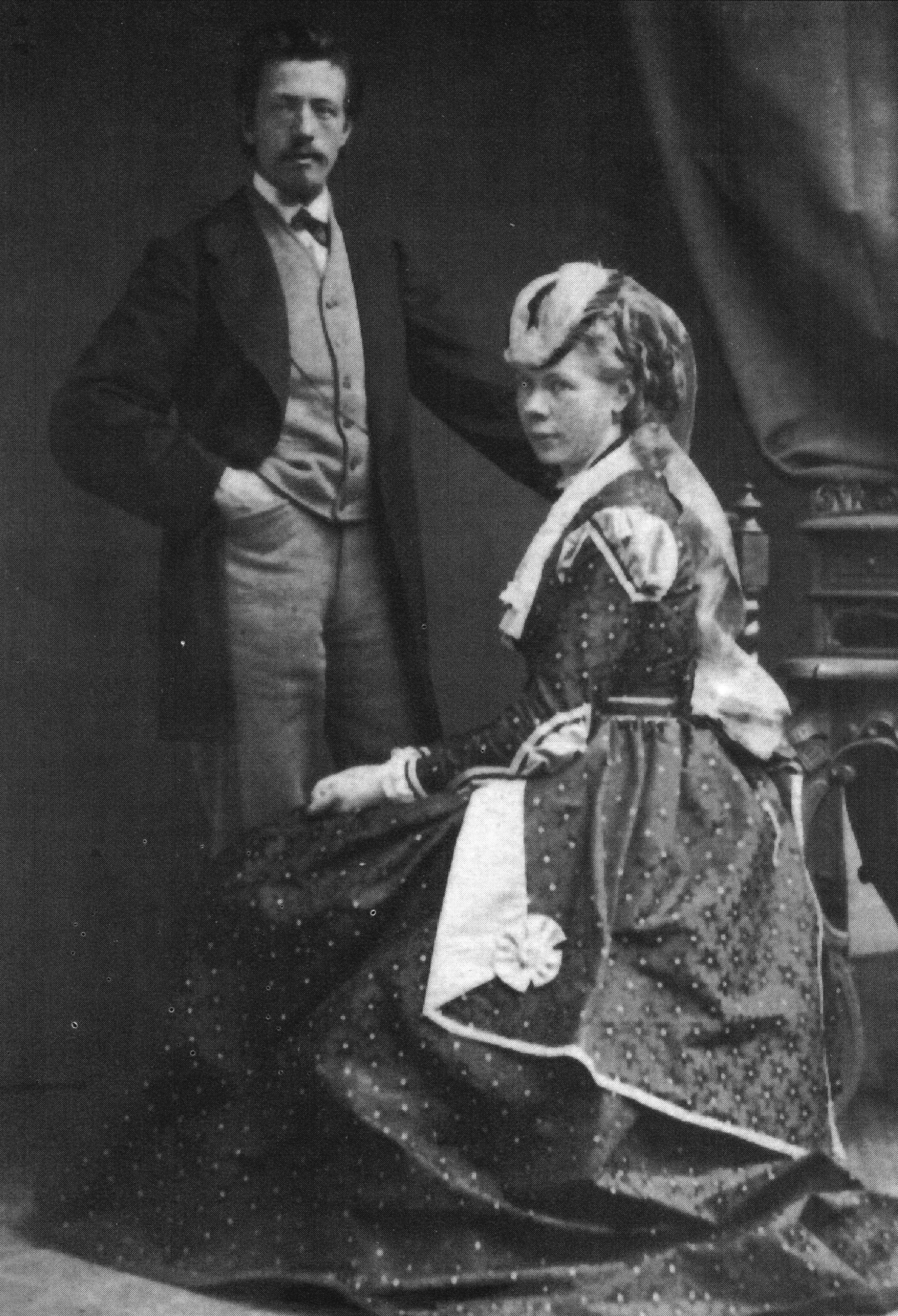 Anton von Werner (1843–1915) mit seiner Verlobten Malvine Schroedter (1847–1901)